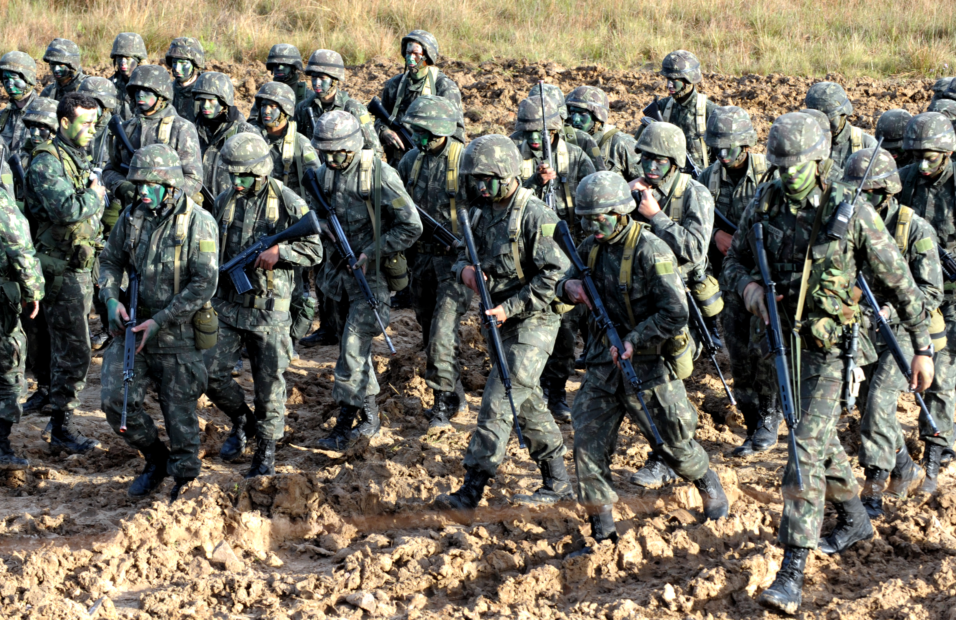 Fotos: Jorge Cardoso